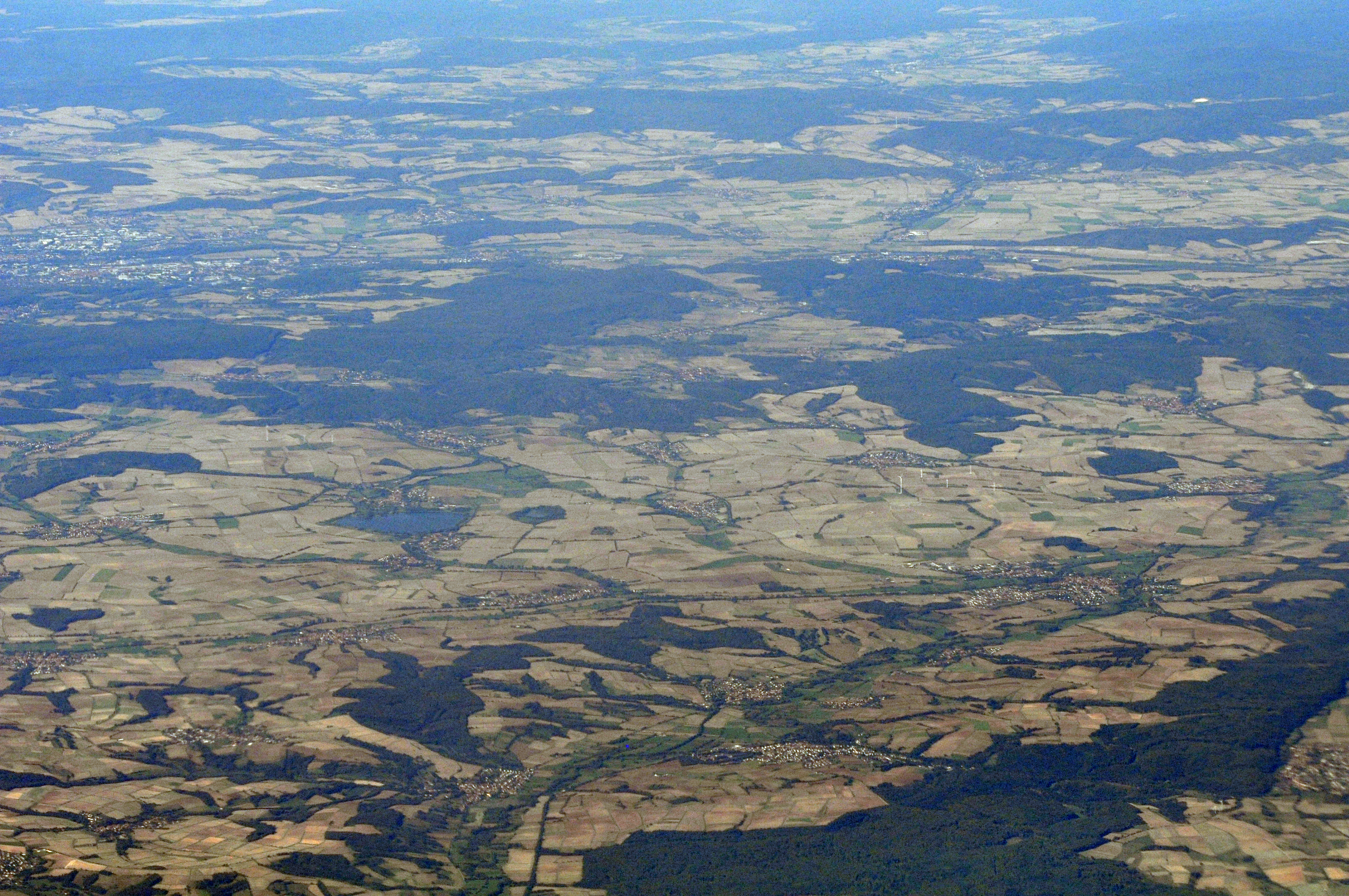 Seeburger See von Osten, etwa Bildmitte leicht links, dahinter der Göttinger Wald, am linken Bildrand Göttingen. Luftaufnahme aus einem Linienflugzeug.